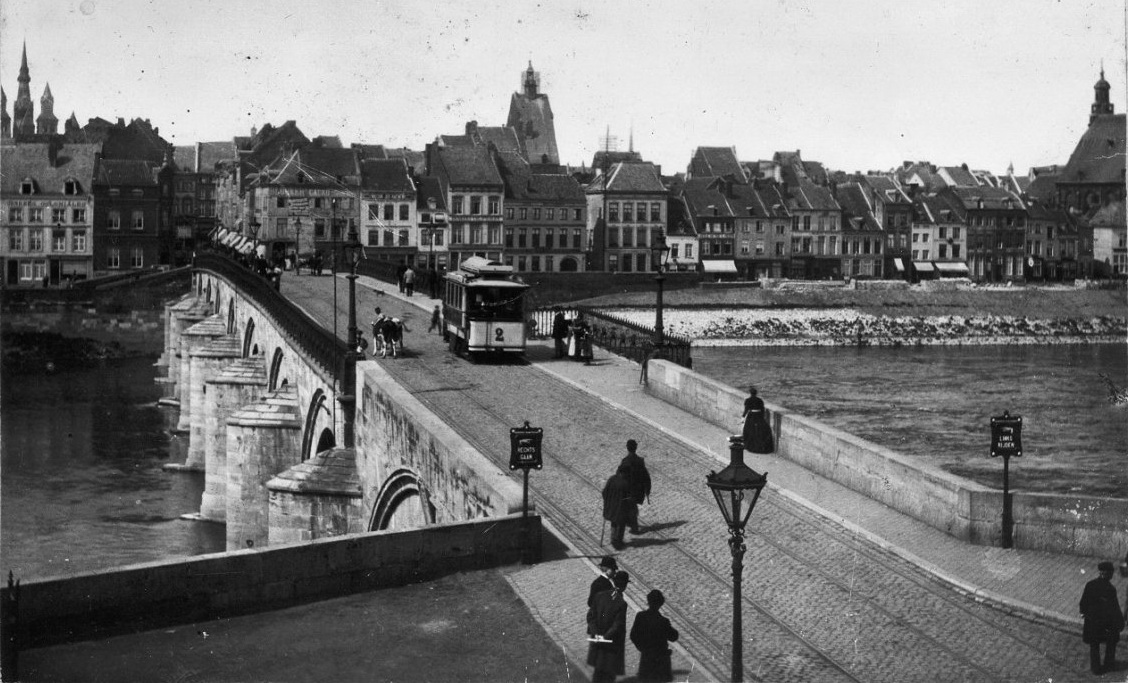 Maasbrug, Oud En Nieuw: Maasbrug, overzicht, reproductie van oude foto